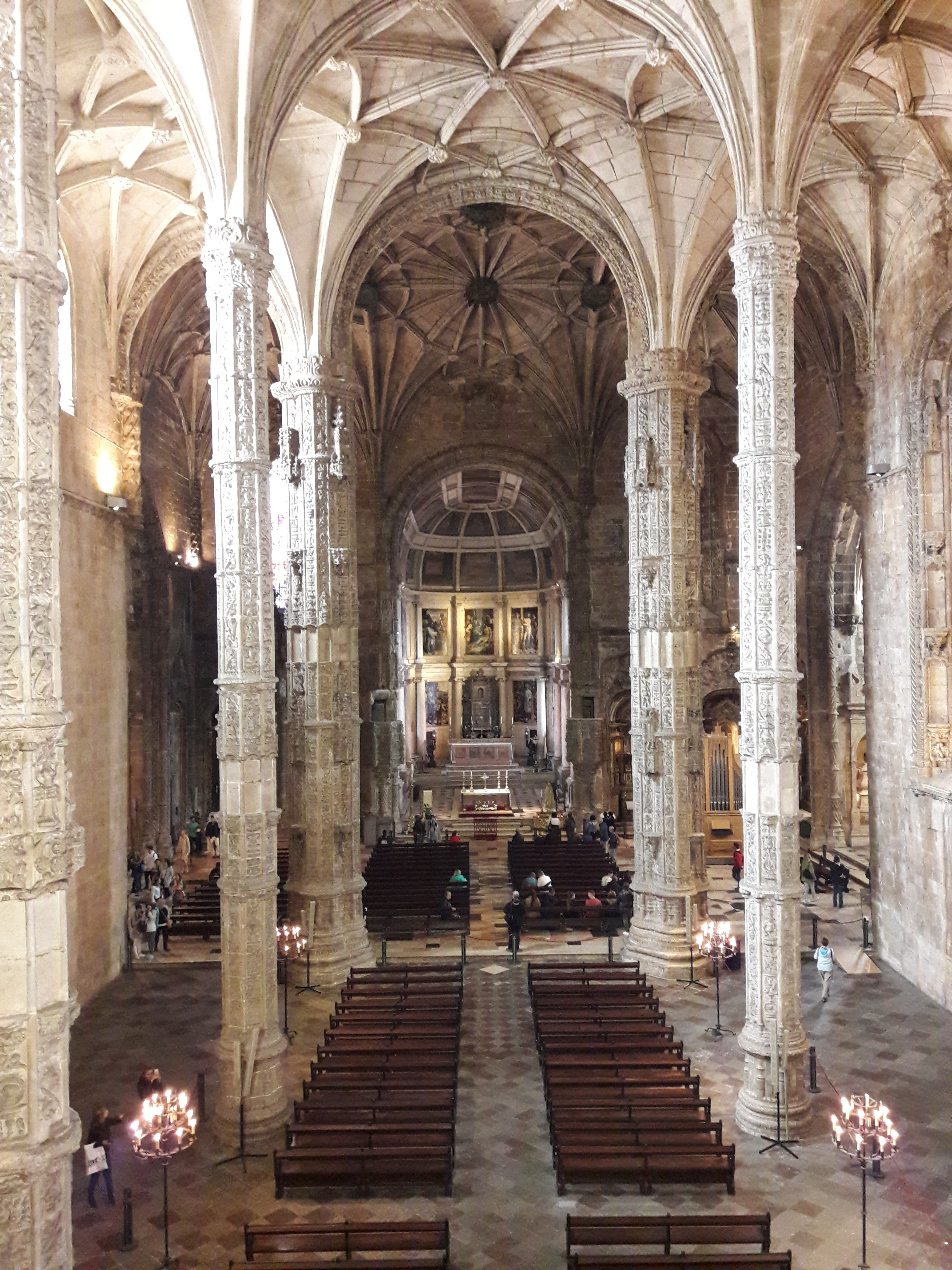 Lisbon